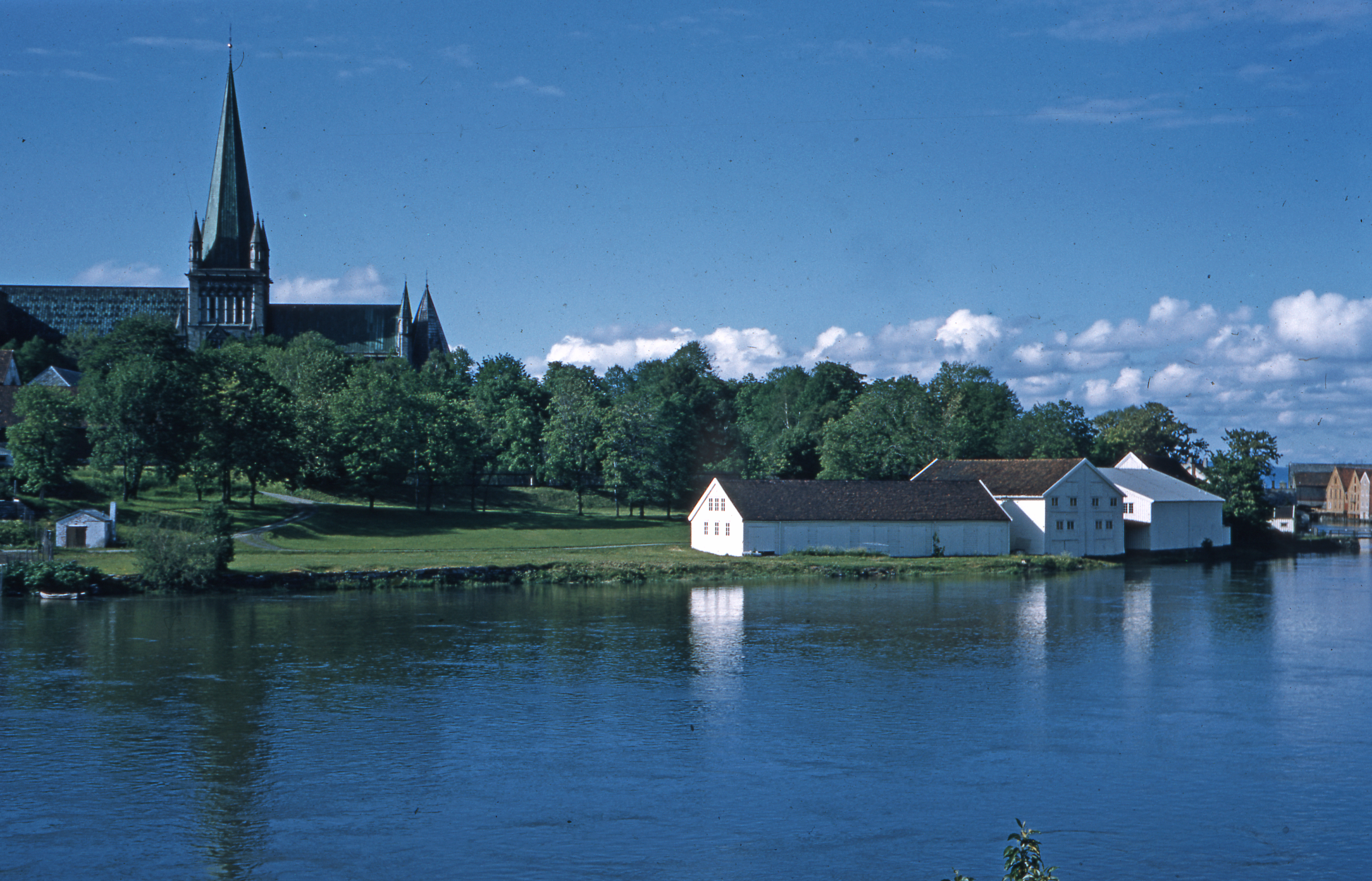 Format: Glasspositiv (Dias) Dato / Date: 1955 Fotograf / Photographer: Ukjent Sted / Place: Marinen, Trondheim Eier / Owner Institution: Trondheim byarkiv, The Municipal Archives of Trondheim Arkivreferanse / Archive reference: Tor.H43.B77.F18534 Merknad: Fra Byantikvarens lysbildesamling. Bildene er merket Trondheim 1954 - 1968, men de aller fleste synes å være fra omkring 1954 / 1955.